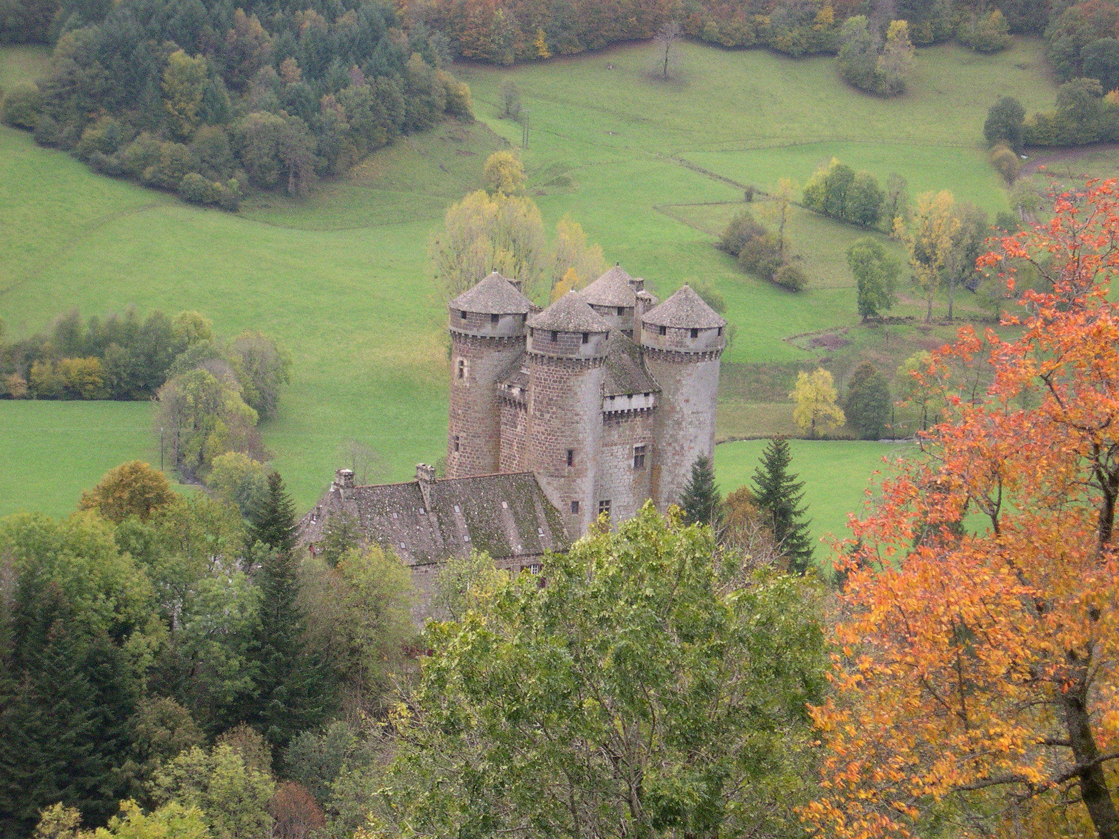 Tournemire (Cantal, Auvergne, France), château d'Anjony